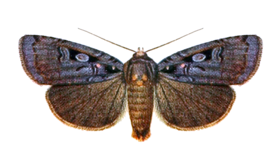 [Agrotis] renalis (Moore) = Xestiarenalis (Moore, 1867), ♂, Punjab.